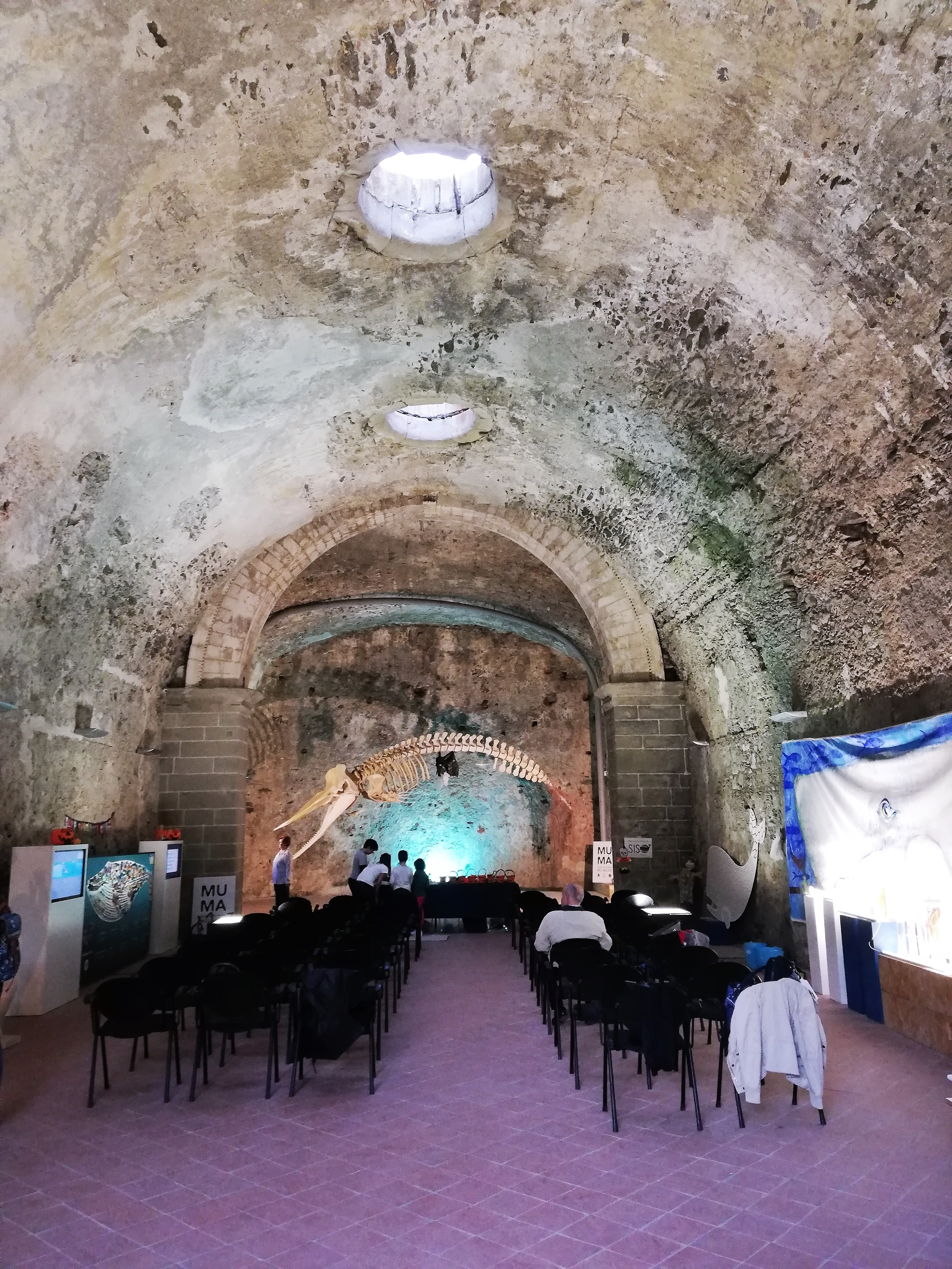 Arco trionfale antica chiesa di Santa Maria, baluardo e bastione di Santa Maria, castello di Milazzo. Odierno salone del Museo del Mare.